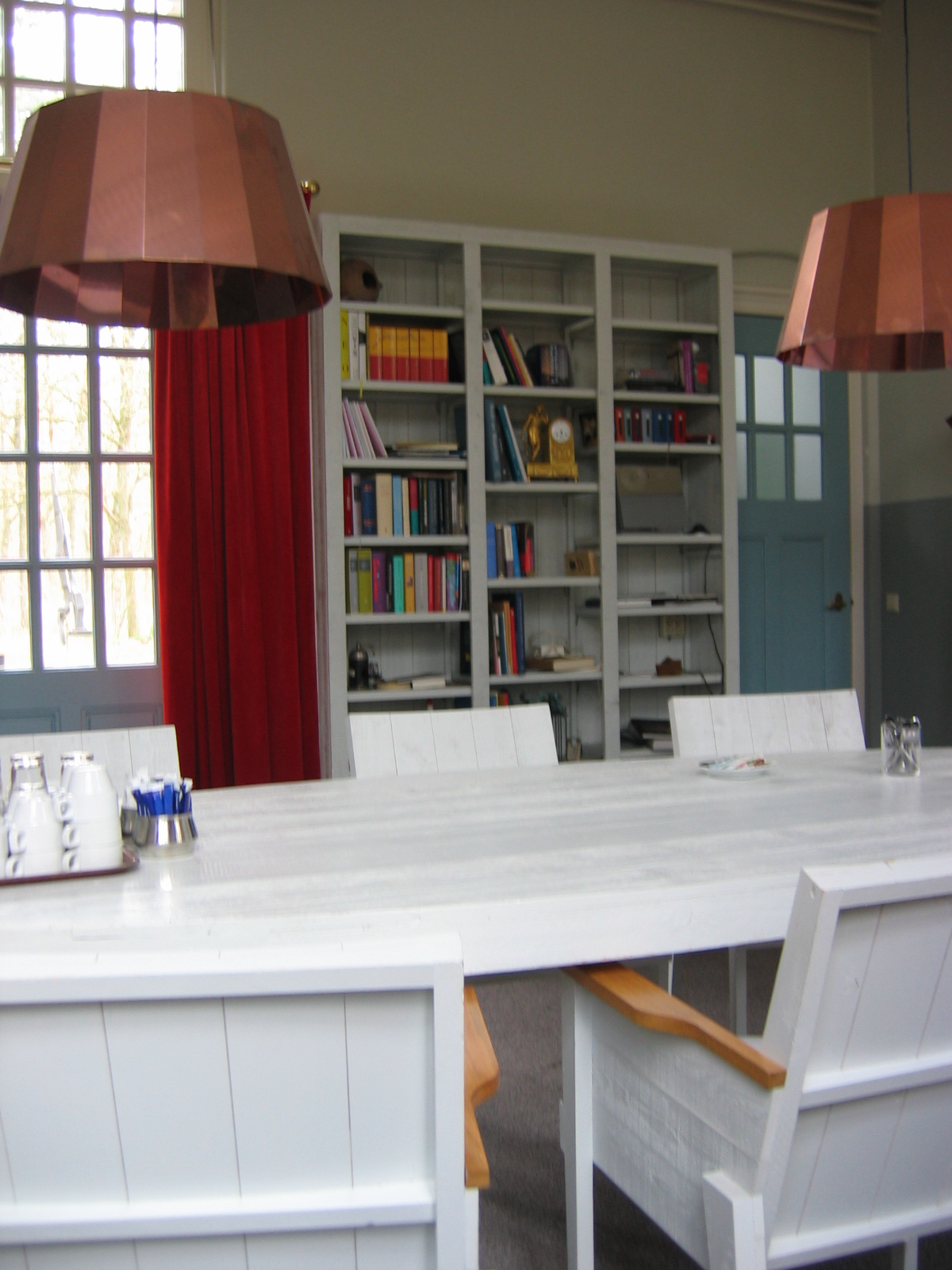 Ontwerp meubels: Piet Hein Eek Voormalig paviljoen ten behoeve van TBC-patienten binnen de psychiatrische kliniek. Gerestaureerd en in gebruik genomen als vergaderlocatie. Rijksmonument 510226 TBC-gebouw Beschrijving door de RIjksdienst voor het Cultureel Erfgoed: Omschrijving complexonderdeel 4 Een aan de rechterzijde van de hoofdas gelegen TBC-PAVILJOEN van één bouwlaag op rechthoekige plattegrond onder een plat dak met overstek op klossen met peerkraalmotief. De bakstenen gevels zijn bepleisterd met uitzondering van de plint, een horizontale band ter hoogte van de bovendorpels en de strekken boven de vensters en deuren. De voorgevel aan de westzijde is zeven vensterassen breed en heeft een symmetrische indeling met drie- en tweelichtsvensters voorzien van bovenlichten en roedenindeling. Op de middenas bevindt zich de ingangspartij bestaande uit een samengesteld venster waarin een deur met zij- en bovenlichten. De achtergevel heeft een symmetrische opzet, waartegen zowel uiterst links als rechts is een klein risalerend bouwvolume onder een plat dak aangebouwd, waarin twee kleine staande roedenvensters zijn gezet. Hiertussen bevinden zich van links naar rechts een dubbele deur met roedenbovenlicht, een pseudo kruisvenster en een drielichts roedenvenster. Aan de geveluiteinden is een staand roedenvenster gezet. De linker zijgevel heeft een tweede ingang bestaande uit een deur met bovenlicht die links van de middenas geplaatst is. De rechterzijgevel is blind. Waardering complexonderdeel 4 Van cultuurhistorische waarde vanwege oorspronkelijke functie alsmede van ensemble waarde als historisch onderdeel van de eerste ontwikkeling W.A. Hoeve.